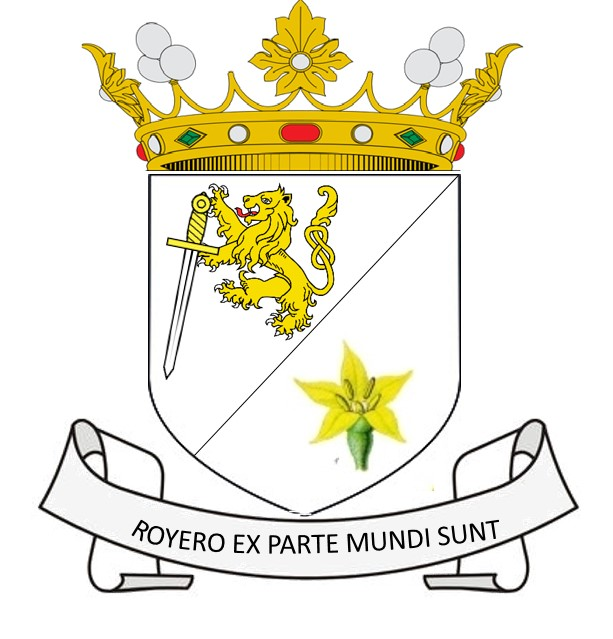 Blasón del apellido Royero